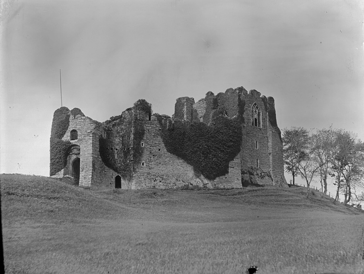 Ffotograffydd/Photographer: P B Abery (1877?-1948) Dyddiad/Date: [191-?] Cyfrwng/Medium: Negydd gwydr / Glass negative Maint/Dimensions: 119 x 163 mm. Cyfeiriad/Reference: PBA74/12 (pba01446) Rhif cofnod / Record no.: 4497824 Rhagor o wybodaeth am gasgliad P B Abery yn Llyfrgell Genedlaethol Cymru More information about the P B Abery Collection at the National Library of Wales